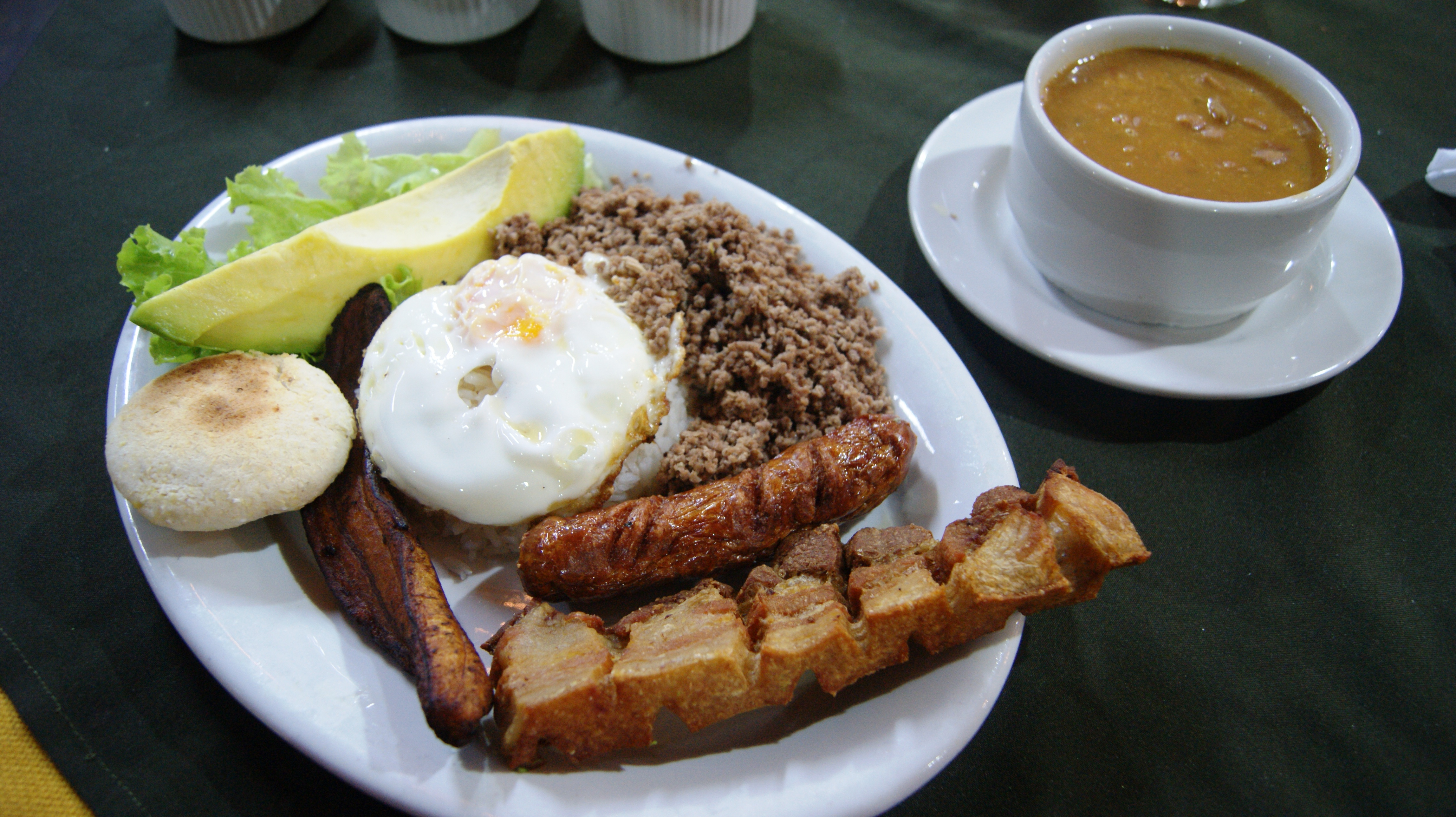 Bandeja paisa. Restaurante Chócolos, Medellín - Colombia.